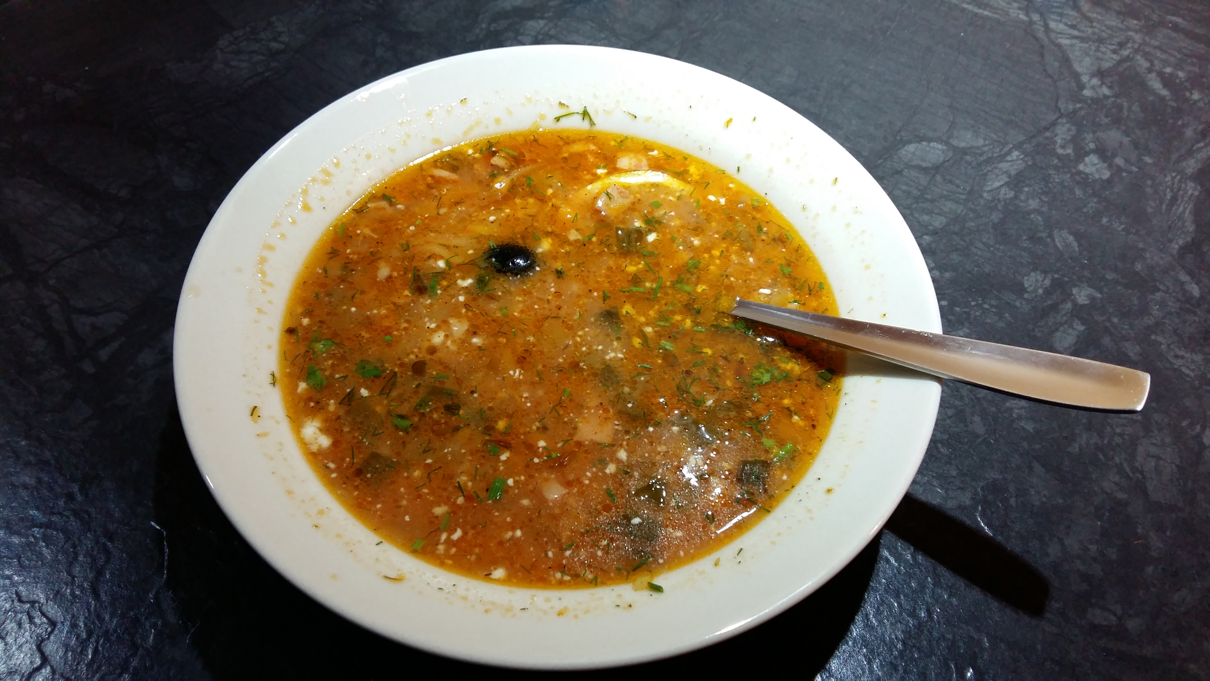 Solanka w barze ukraińskim Kalejdoskop w Krakowie (przejście podziemne przy dworcu Kraków Główny).